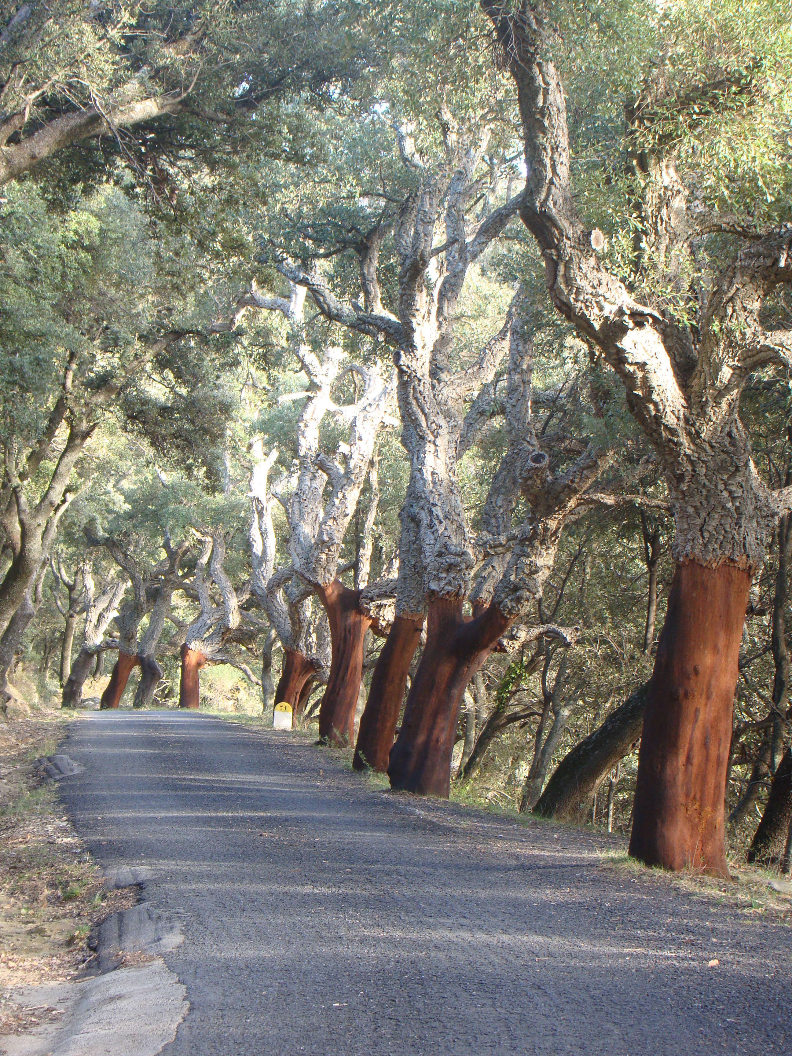 Route menant au hameau de Saint Jean de l'Albère juste avant l'entrée du village.